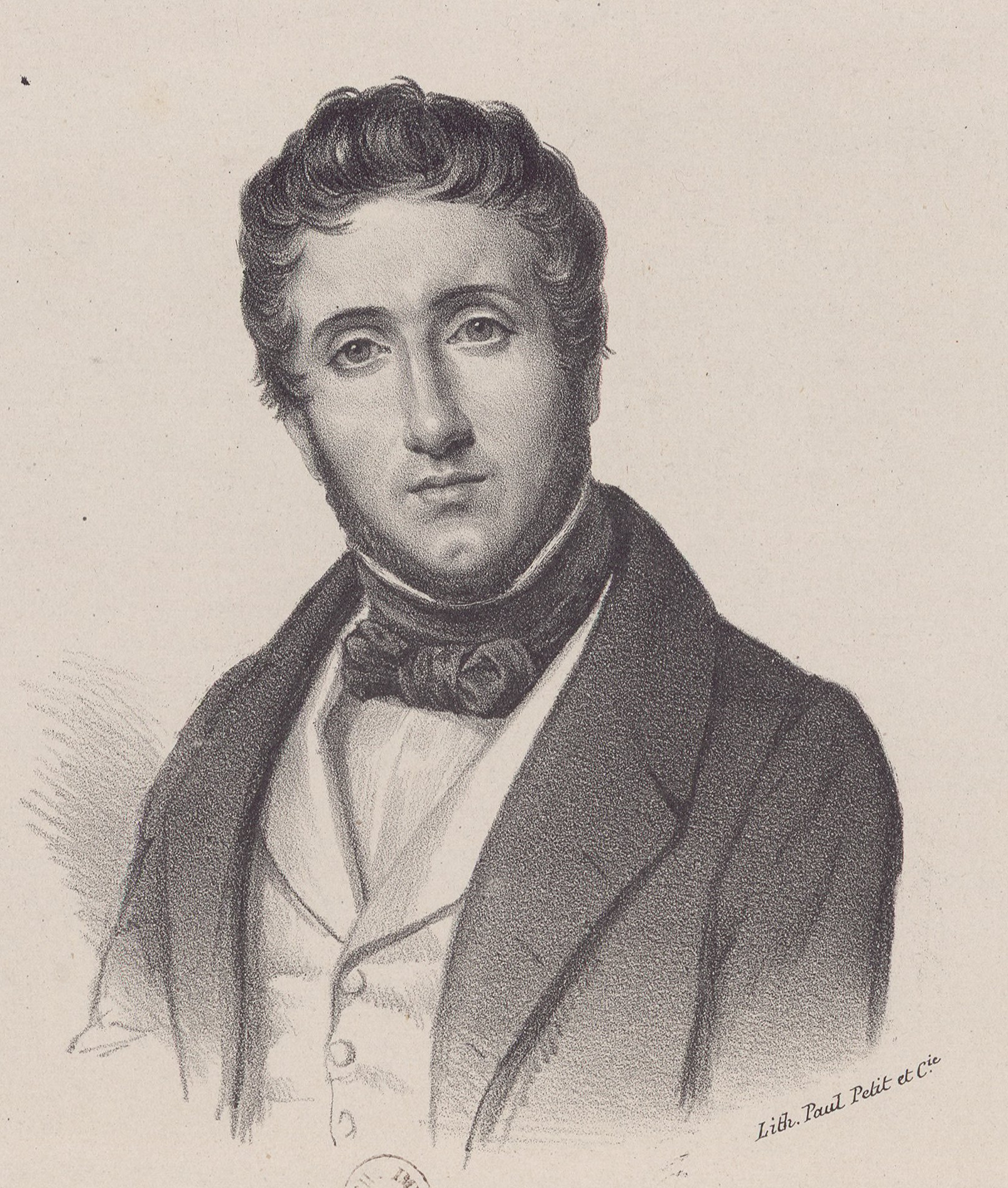 Portrait de Jean Zuléma Amussat